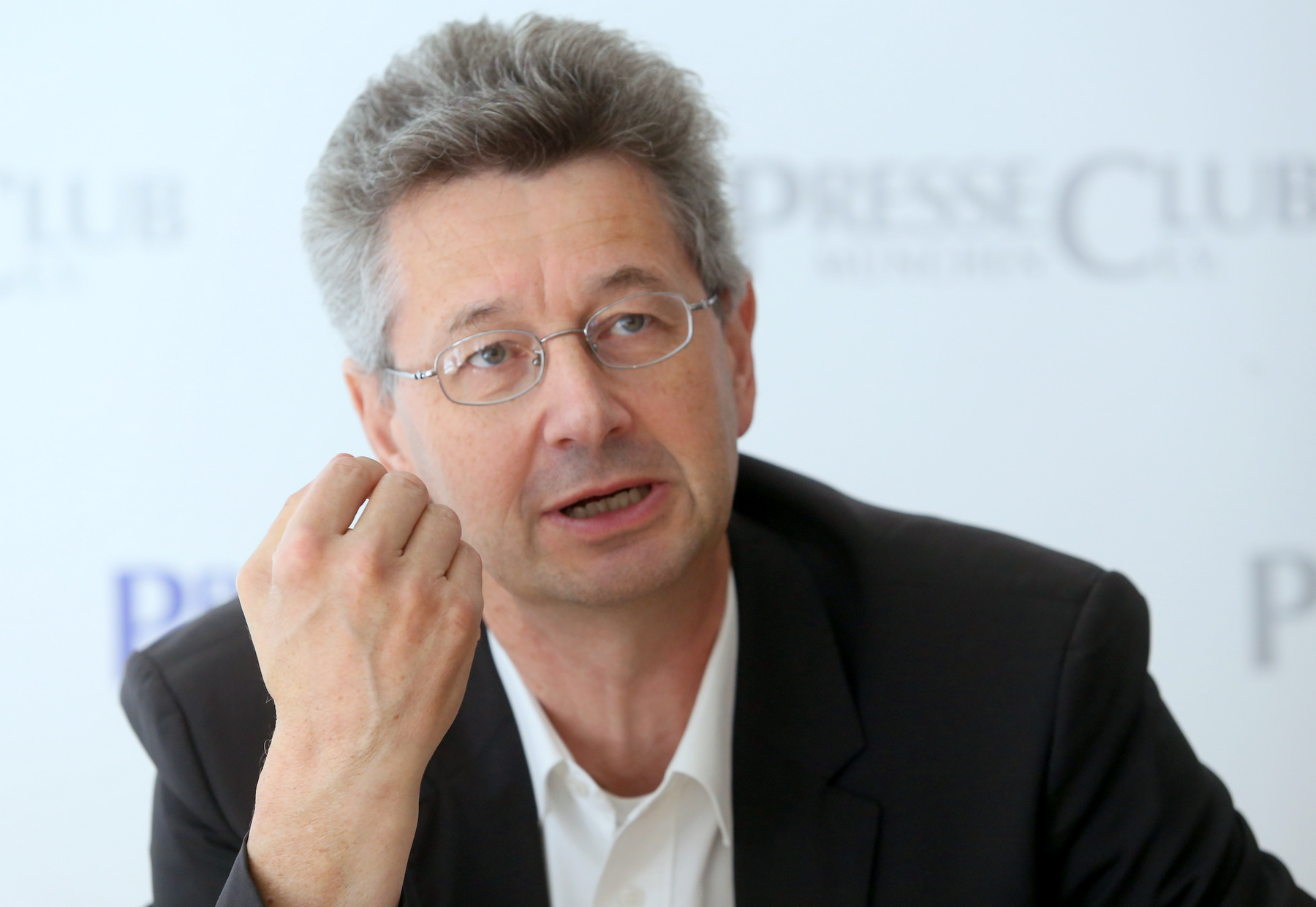 Michael Piazolo, deutscher Politker (FREIE WÄHLER), Abgeordneter des bayerischen Landtages, und Professor für europäische Studien an der Hochschule für angewandte Wissenschaften München. Hier am 7. August 2017 während einer Veranstaltung im Münchner PresseClub. Titel des Werks: "Michael Piazolo, FREIE WÄHLER, im Münchner PresseClub (2017)"